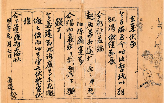 YunSeondo seosin in 1654